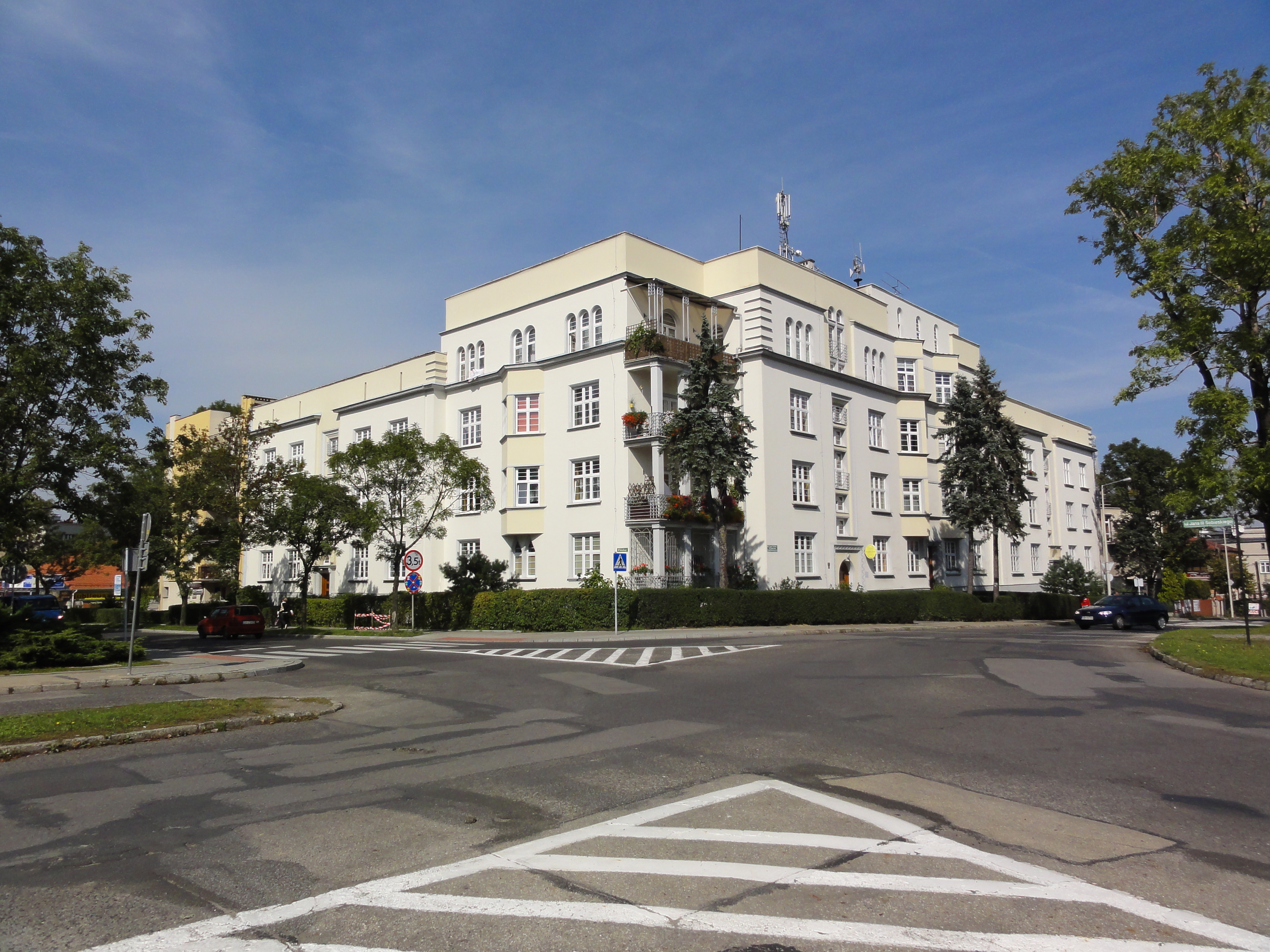 Bielsko-Biała, Dom Oficerski